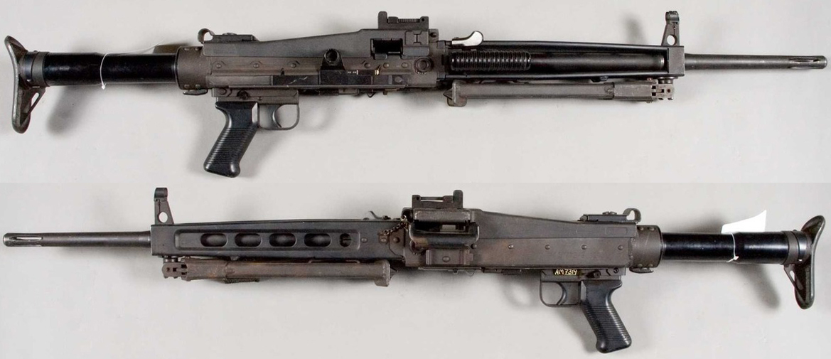 Švicarska strojnica MG 710-3, zasnovana po nemški MG 42.